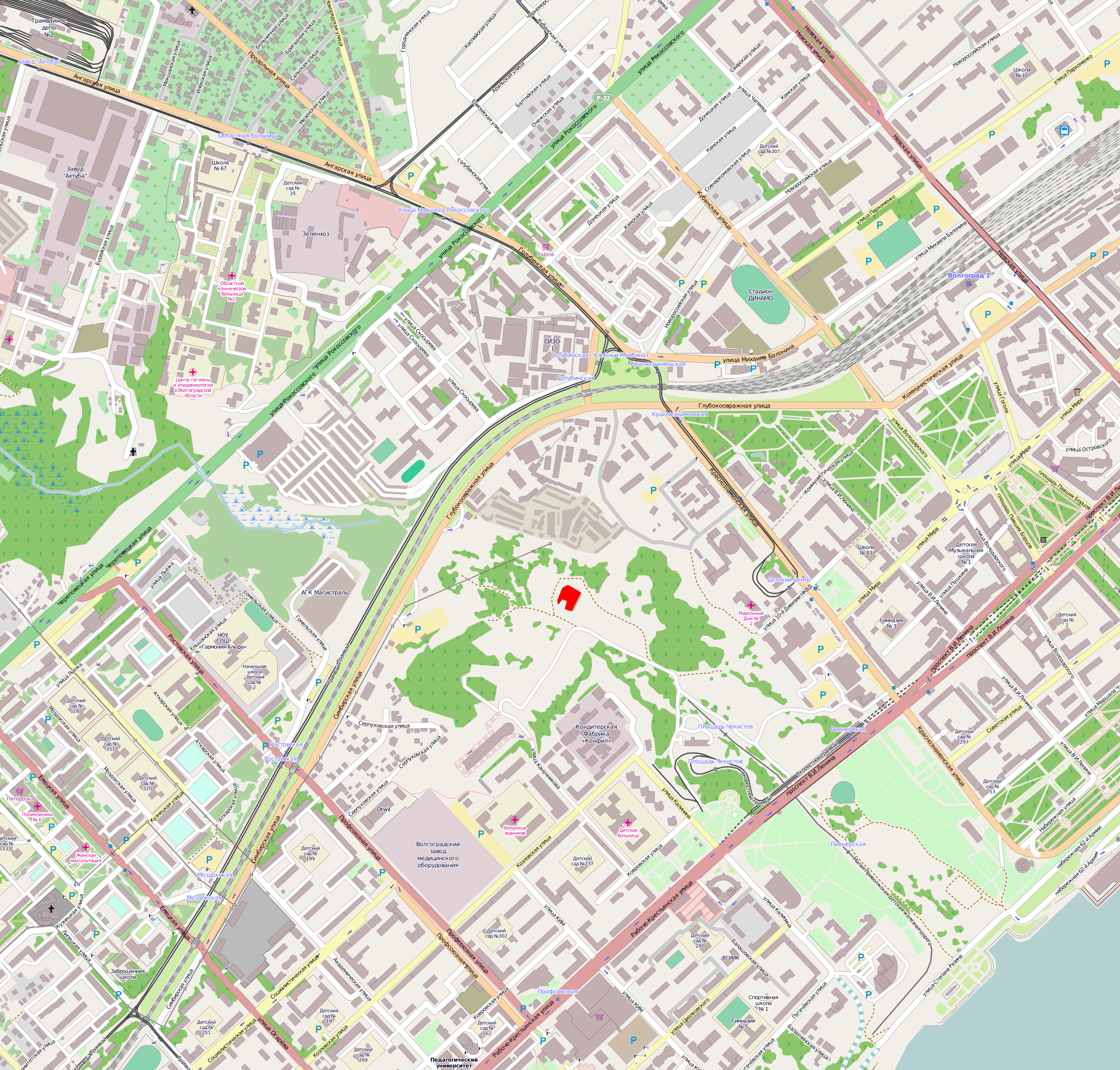 Схема расположения Морятника (отмечен красным) This map of Volgograd was created from OpenStreetMap project data, collected by the community. This map may be incomplete, and may contain errors. Don't rely solely on it for navigation.